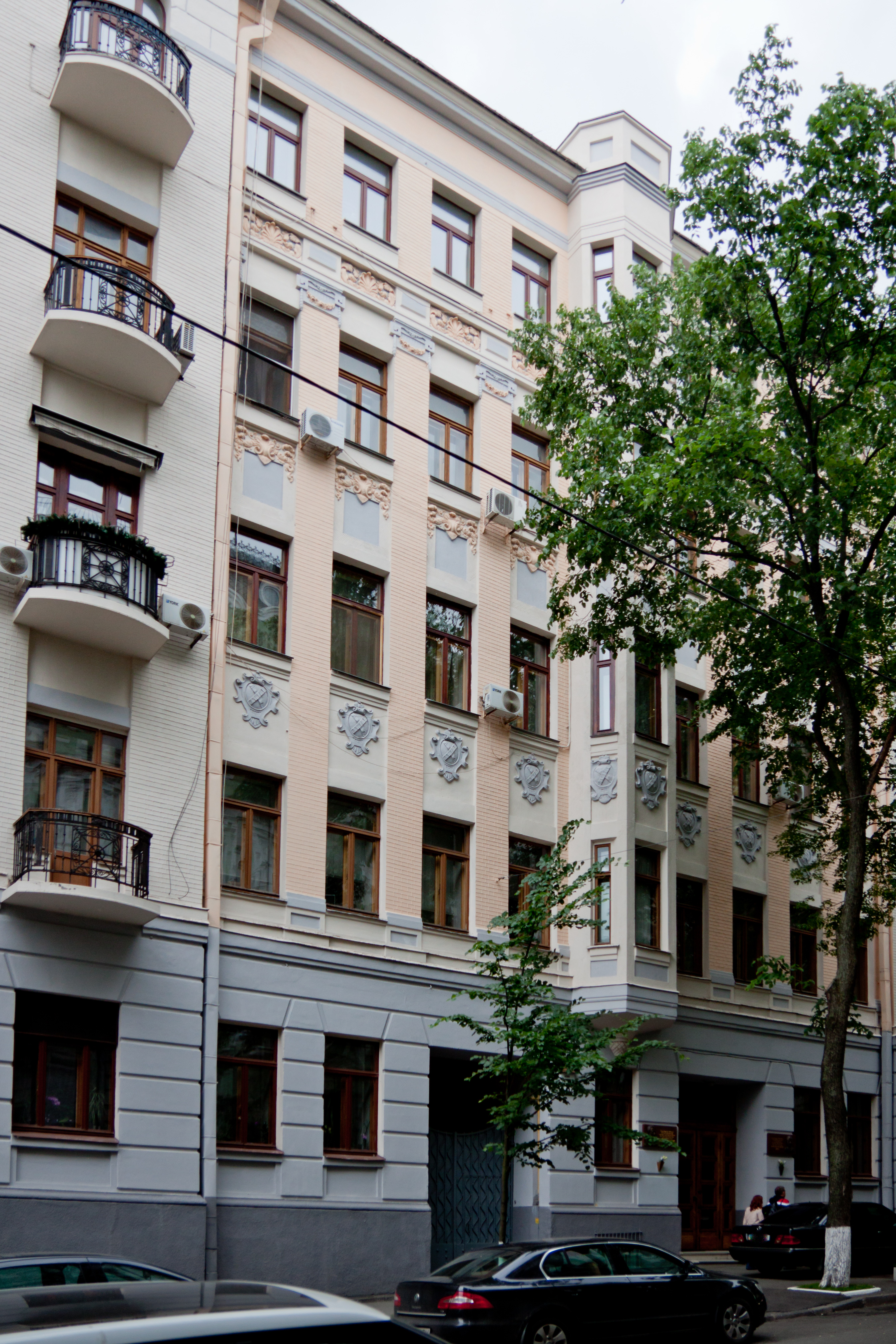 Доходный дом сахарозаводчика семьи сахарозаводчика и французского консульского представителя Даниила Балаховского в Киеве (ул. Трёхсвятительская, 24, ныне Десятинная,8).